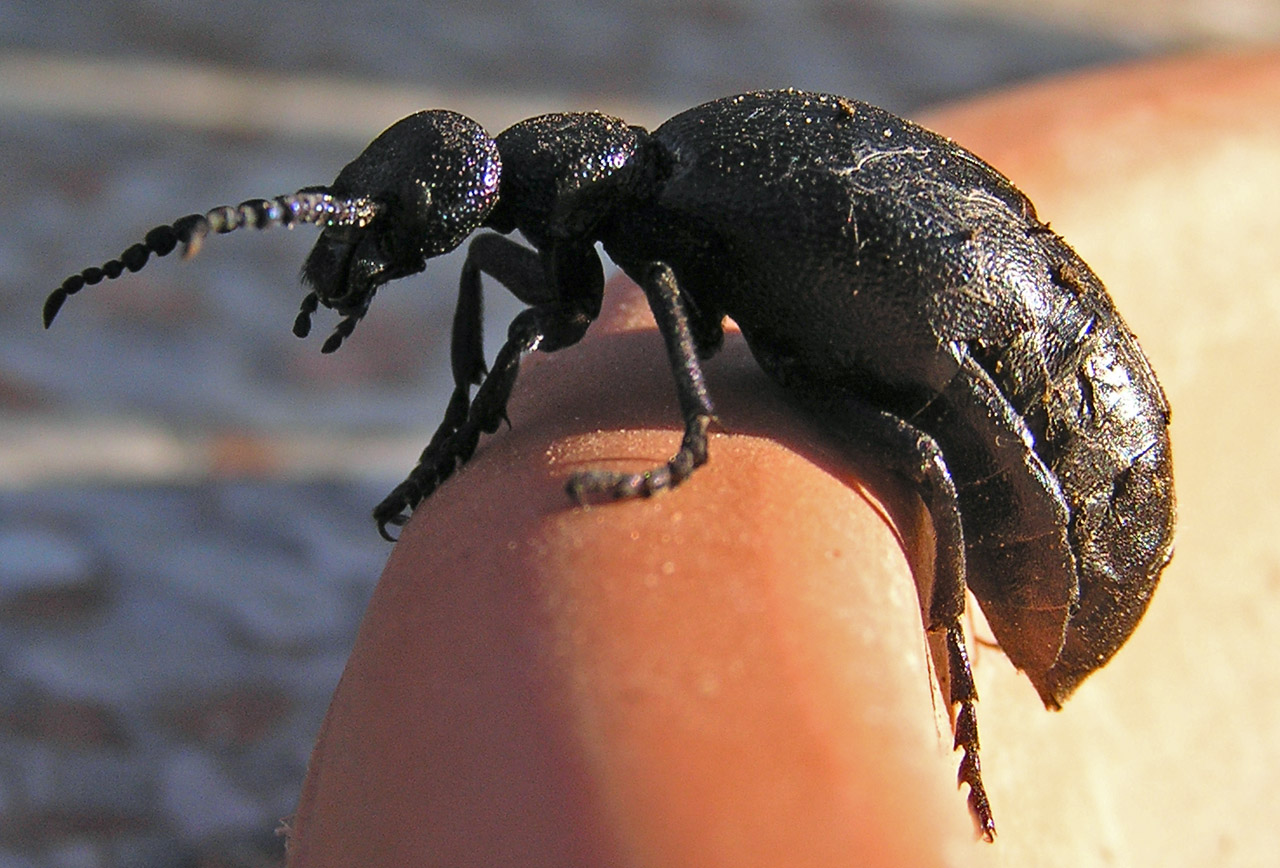 Beschreibung: Ölkäfer Meloë proscarabaeus Fotograf: Darkone, 3. April 2005